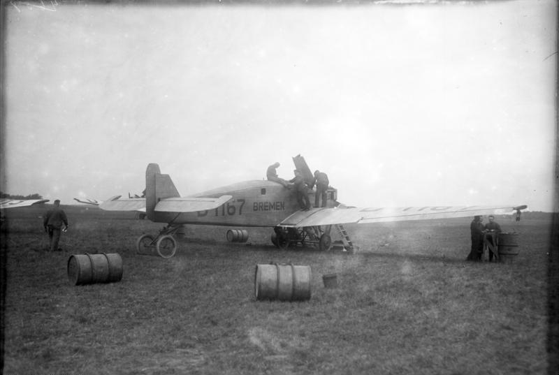 Der Start des deutschen Junkers-Flugzeuges "Bremen" zum Amerikaflug. Die deutsche Junkersmaschine "Bremen" wird auf dem Flugplatz in Baldouel zum Start fertig gemacht.